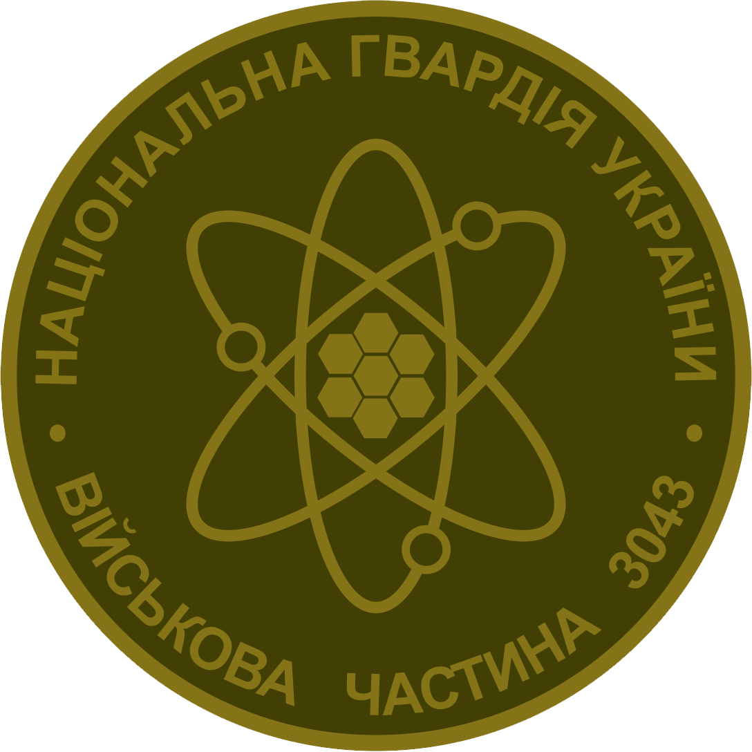 Нарукавний знак, 3 окремий батальйон охорони особливо важливих державних об'єктів